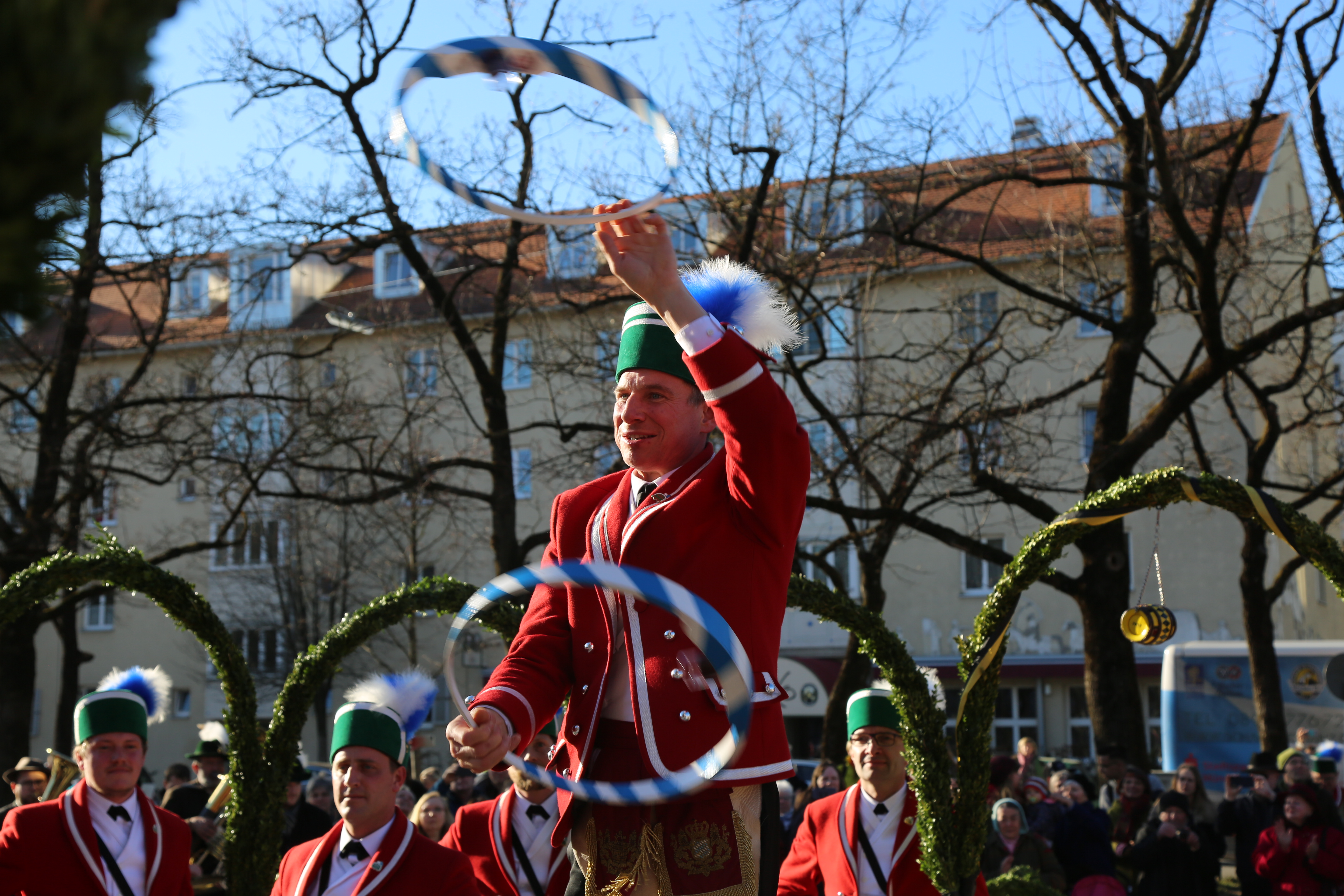 Schäfflertanz 2019 auf dem Münchner Mariahilfplatz Tanz mit den Ringen